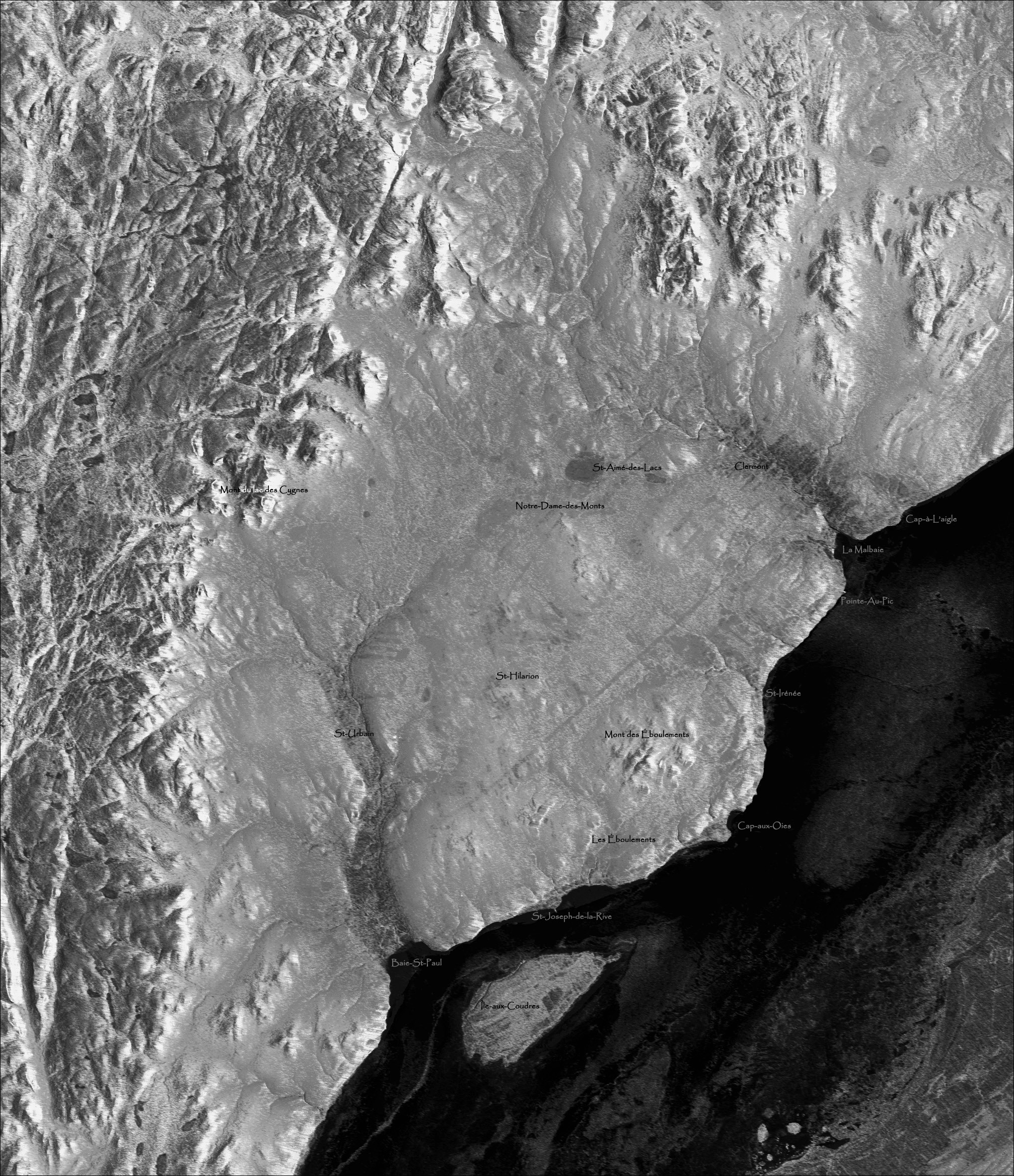 Modèle numérique de terrain de l'Astroblème de Charlevoix, Québec, Canada. La position des municipalités a été indiquée à partir d'une image modifiée.